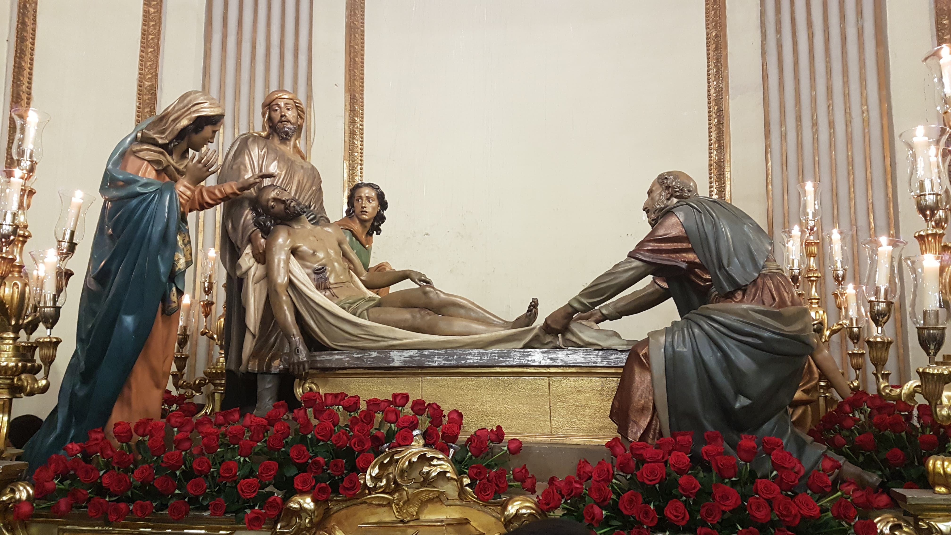 Paso del Santo Sepulcro, titular de la cofradía del mismo nombre de Murcia (España), obra de Juan González Moreno (1941)